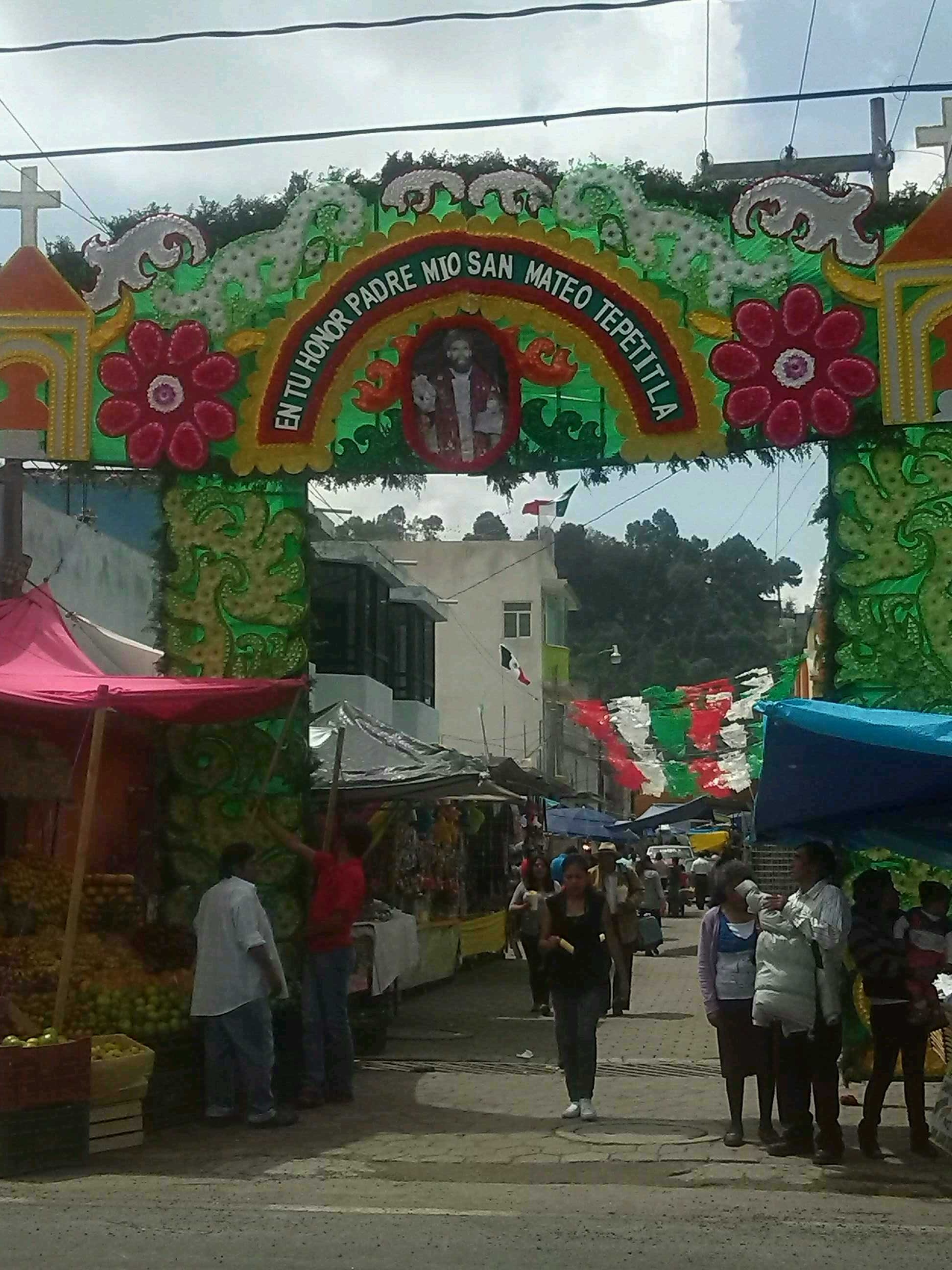 Fiesta patronal. Tepetitla, Tlaxcala